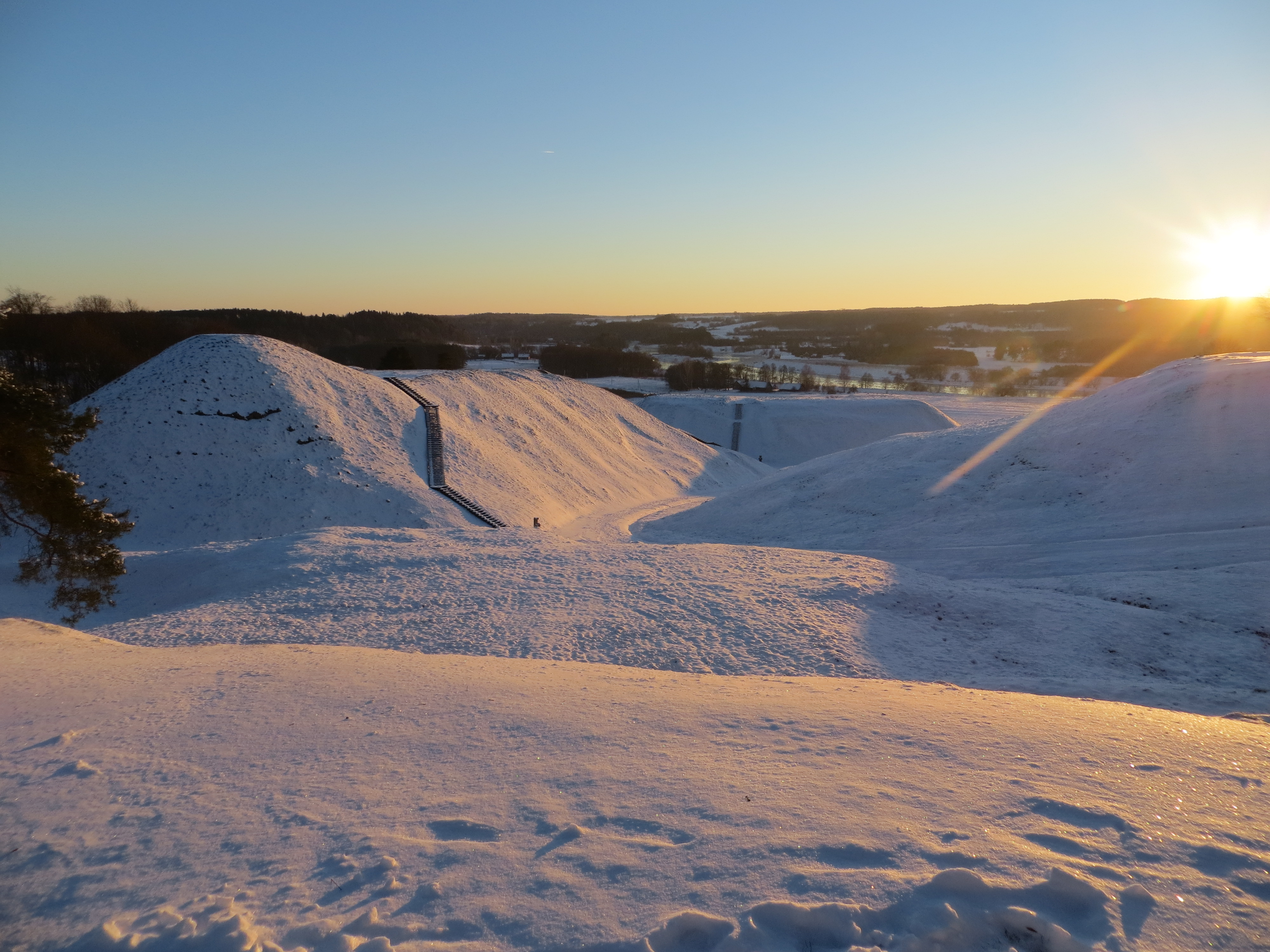 Kernavė 19172, Lithuania